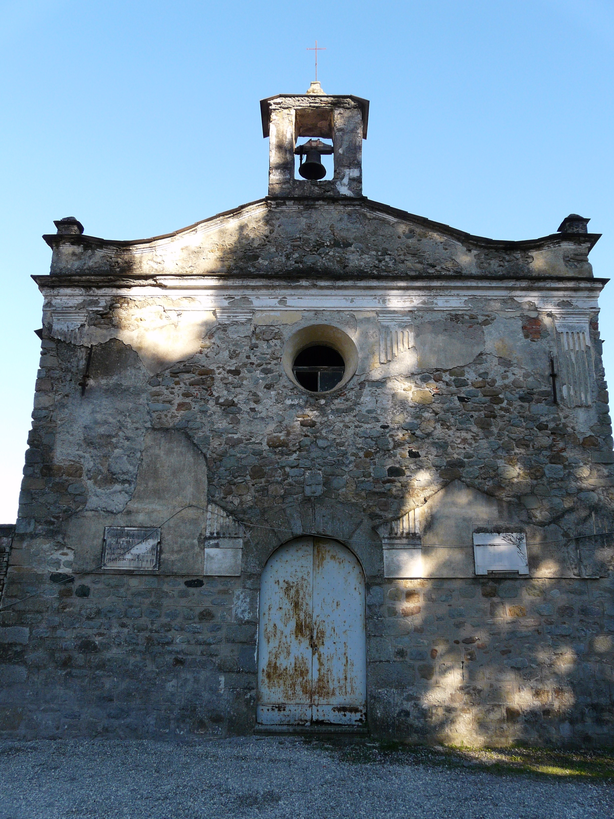 Abbazia dell'Accola, Borghetto di Vara, Liguria, Italia